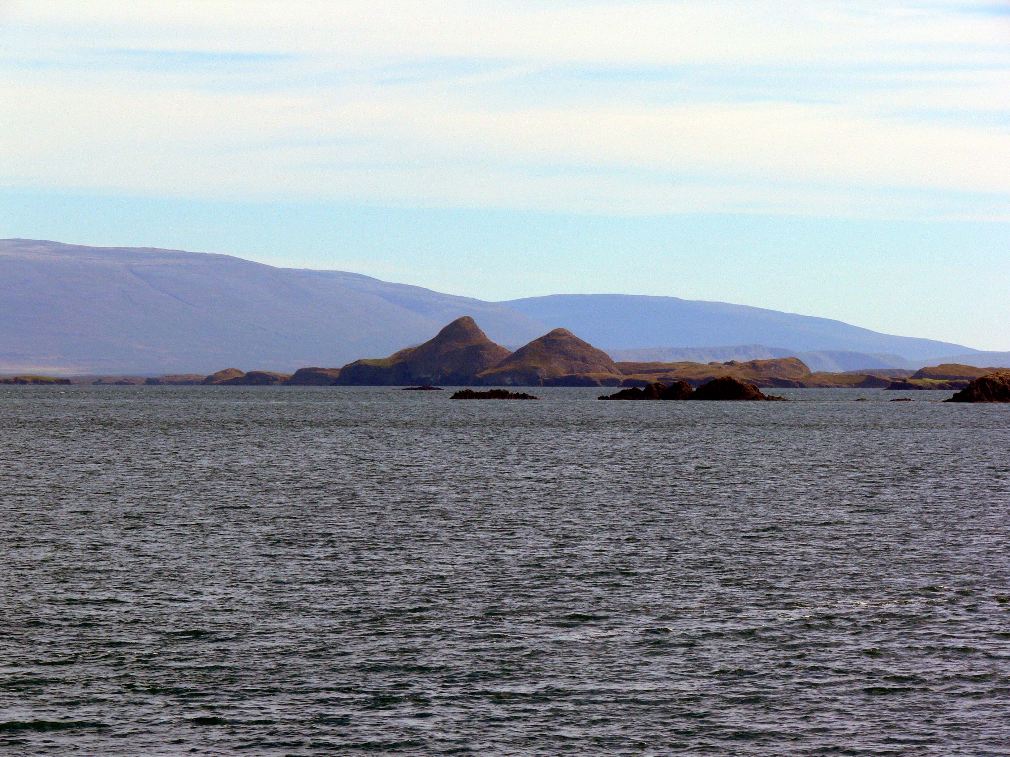 Die höchsten Inseln des Breiðafjörður.